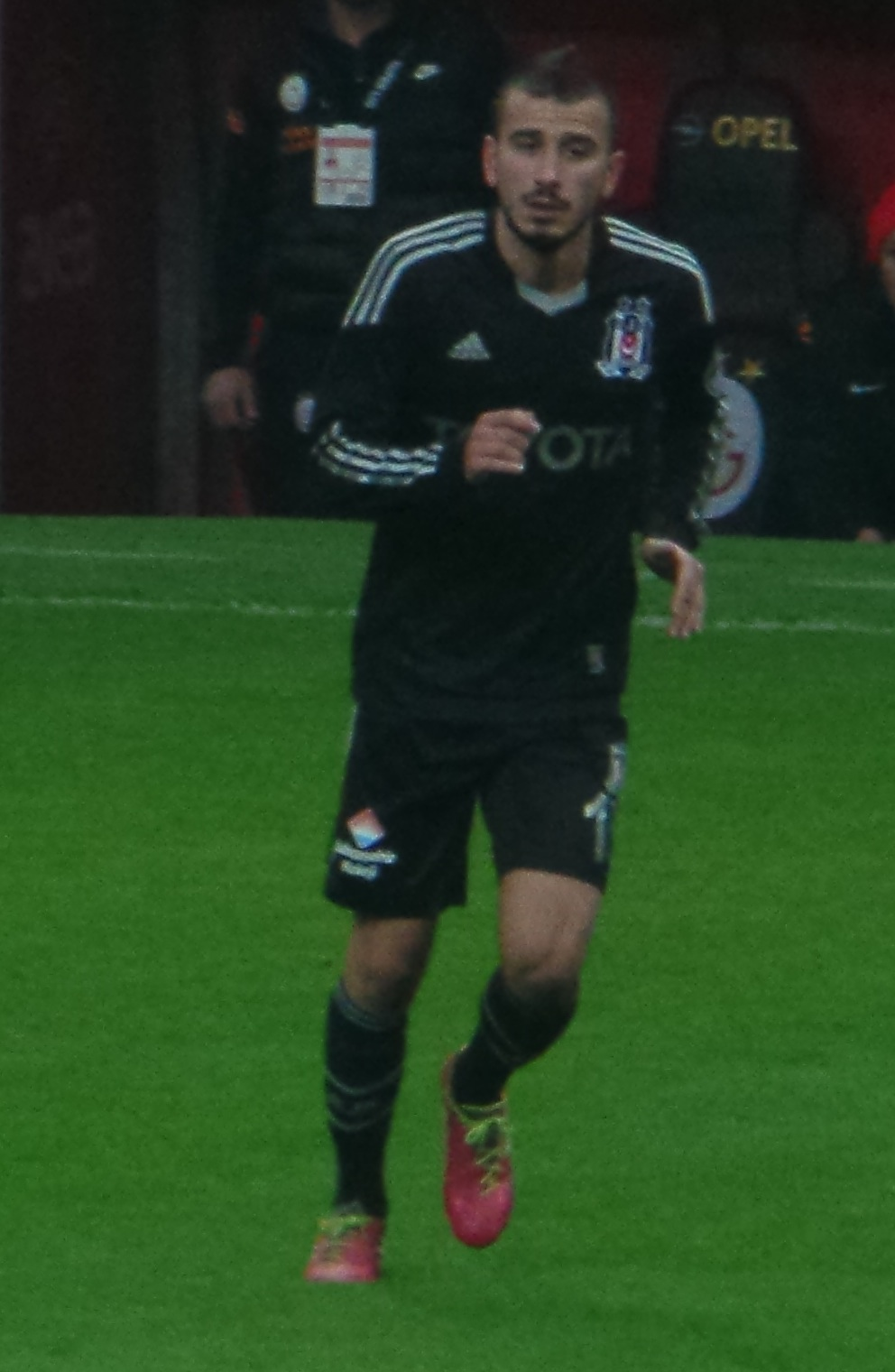 Oğuzhan Özyakup